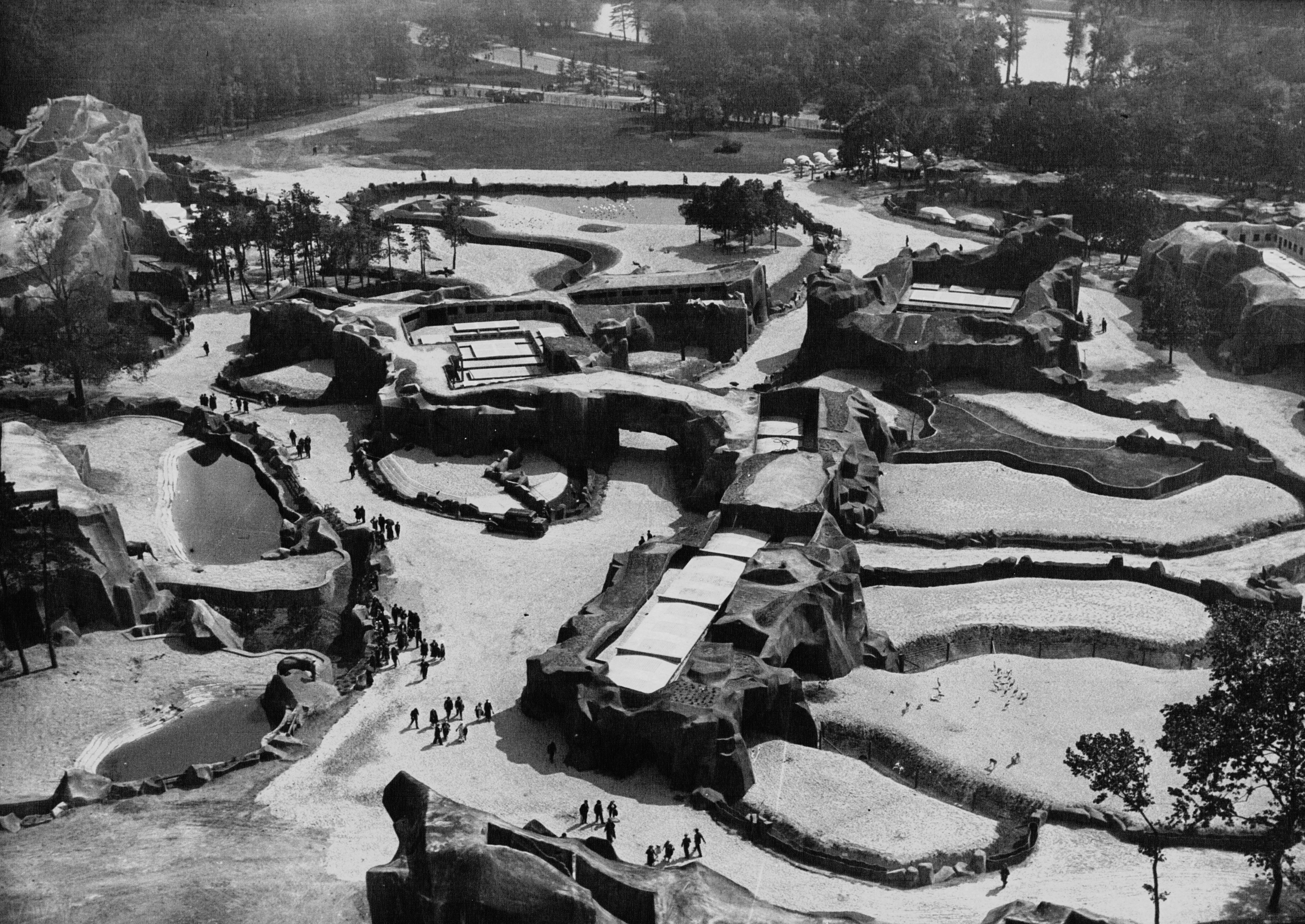 Le zoo de Vinennes en 1934. Vue générale.